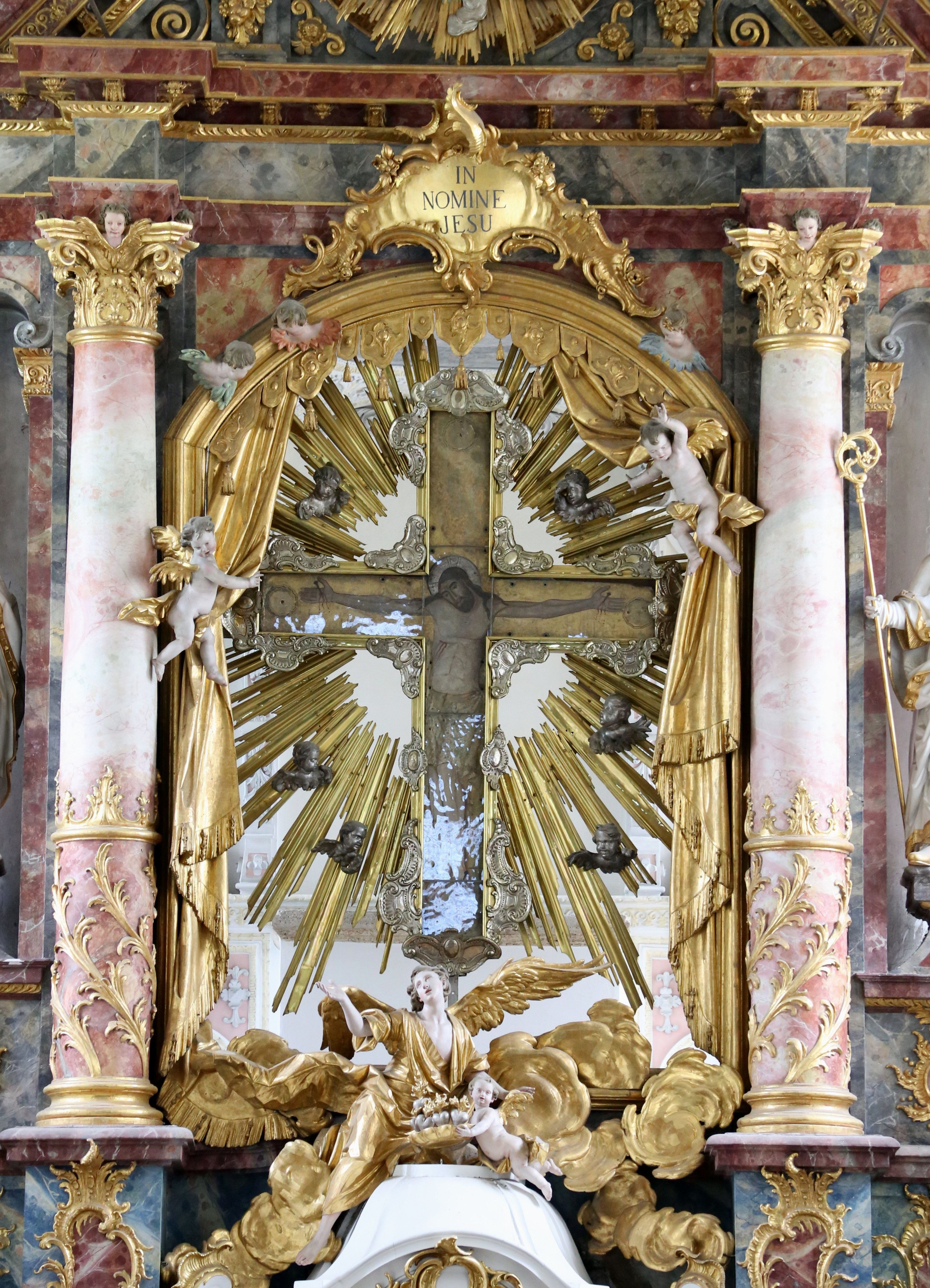 Kloster Polling; ehem. Stiftskirche St. Salvator und Hl. Kreuz, jetzt kath. Pfarrkirche, spätgotische Hallenkirche zu drei Schiffen mit stark eingezogenem gerade schließendem Chor und angefügten Nebenräumen, Neubau 1416/20, 1621/28 Barockisierung und Erweiterung nach Osten durch einen dreijochigen Umgangschor nach Plänen von Hans Krumpper, Neugestaltung der Westfassade 1727/28 durch Joseph Schmuzer, Turm im Stil der Renaissance nach Hans Krumpper 1603/10, Turmabschluss 1822 durch Oktogon mit Zeltdach; mit Ausstattung